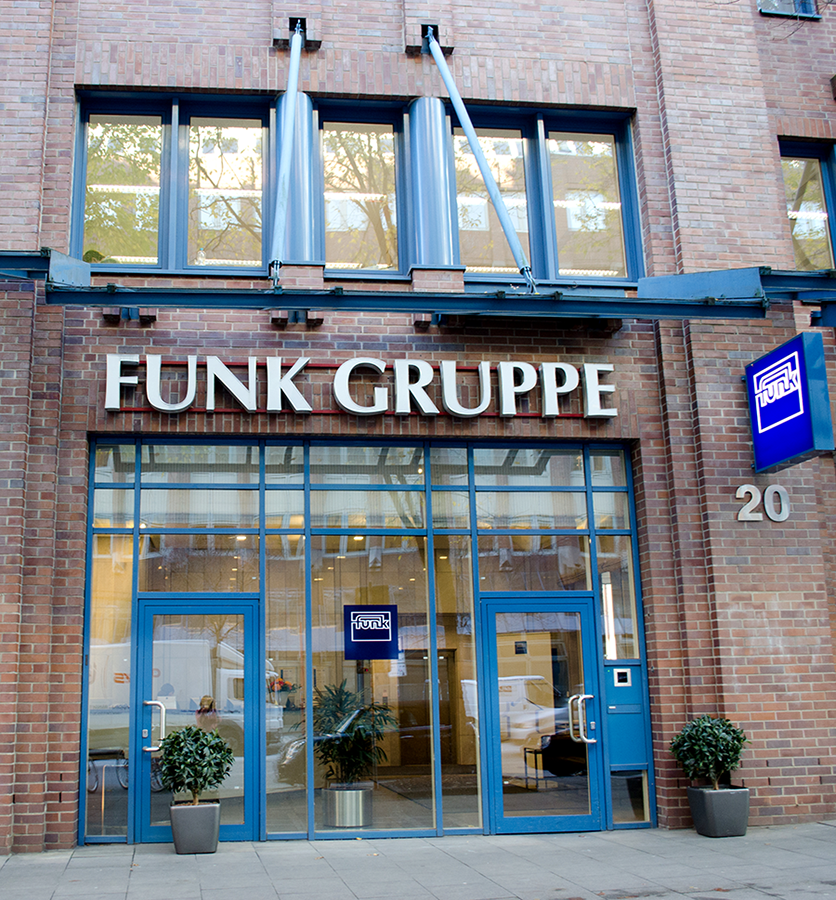 Funk_Gruppe_Entrance